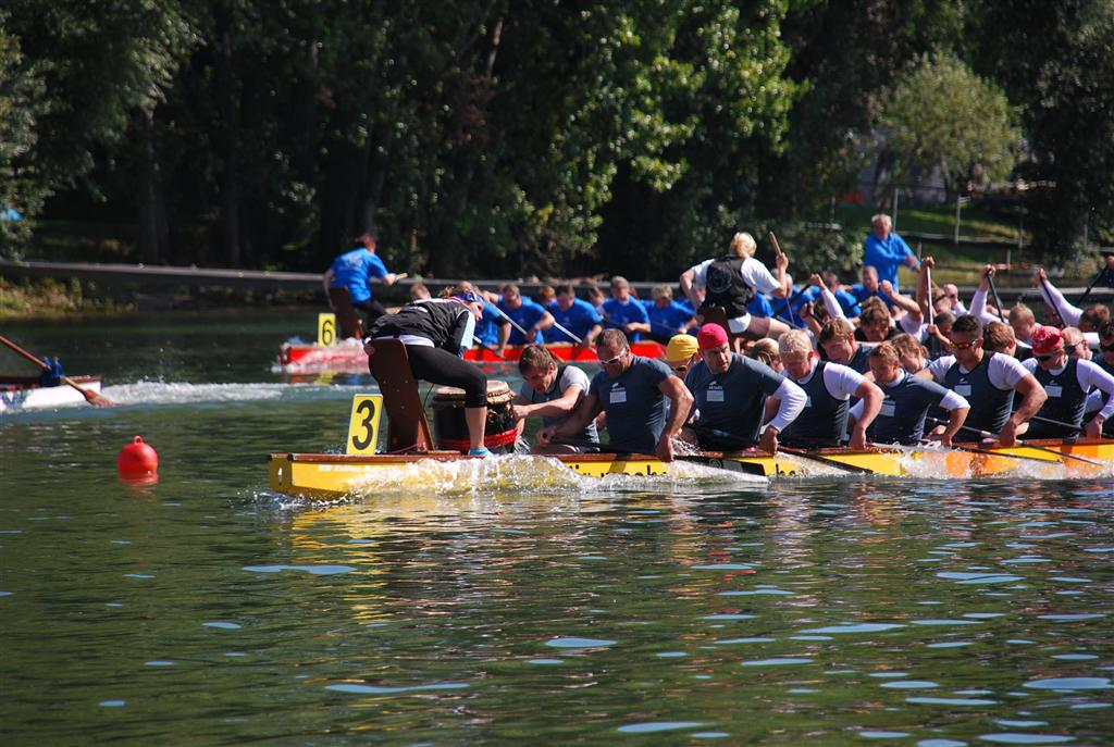 Foto Drachenboot